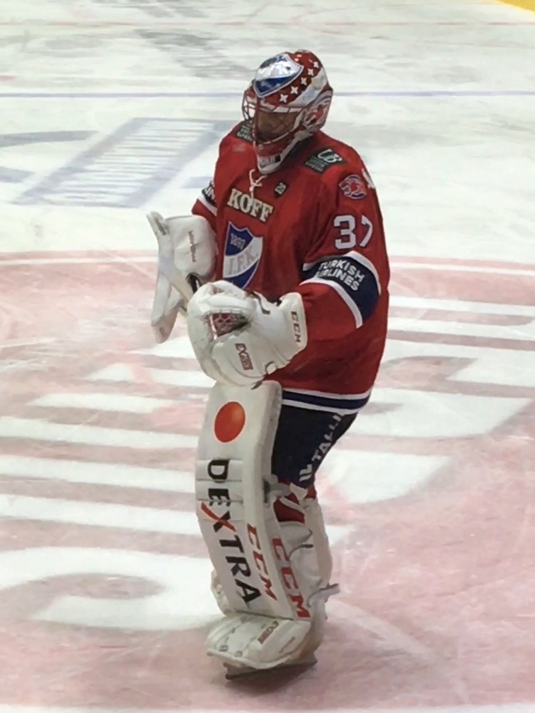 Jääkiekkoilija Niklas Bäckström edustamassa Helsingin IFK:ta 13. lokakuuta 2016 ottelussa HIFK–SaiPa.